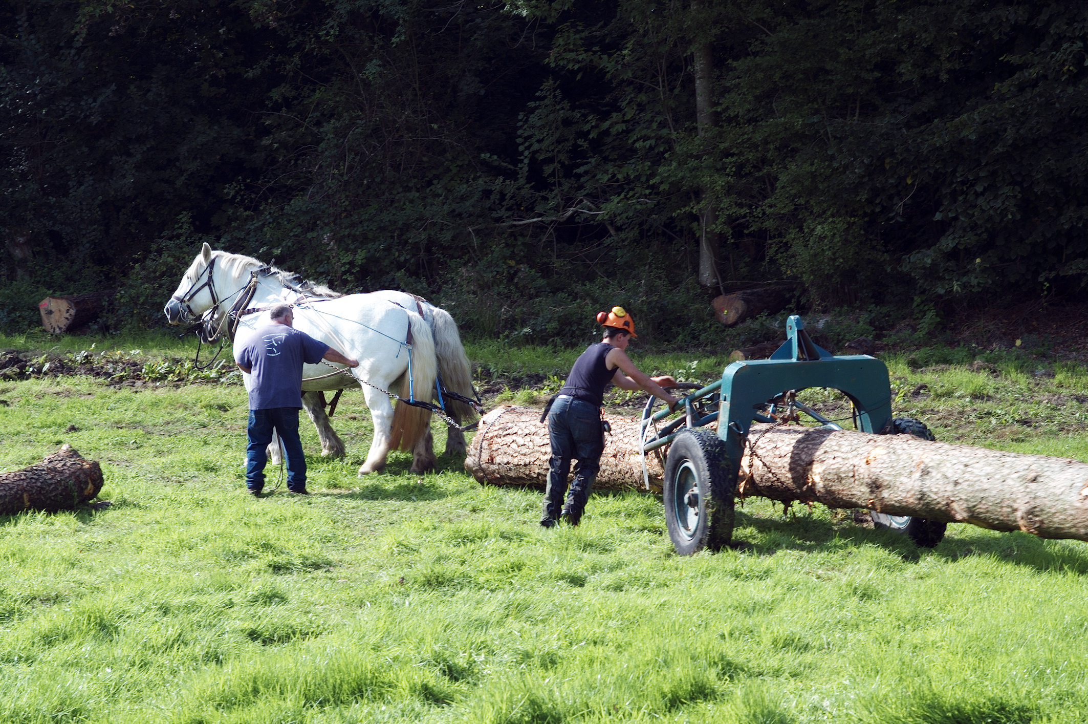 INRA, JEan Weber